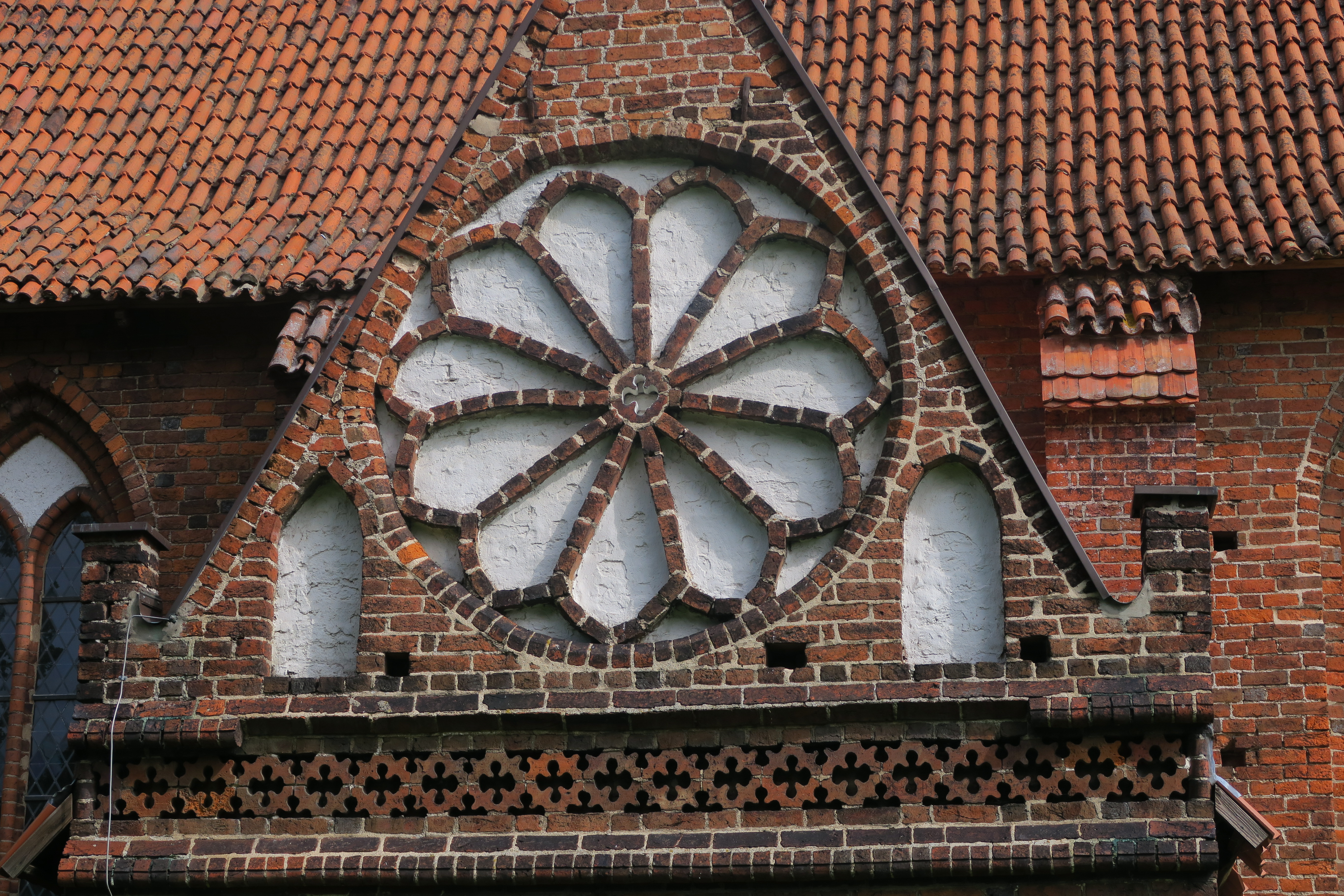 Rosette aussen am Anbau an der Dorfkirche St. Laurentius in Hornstorf